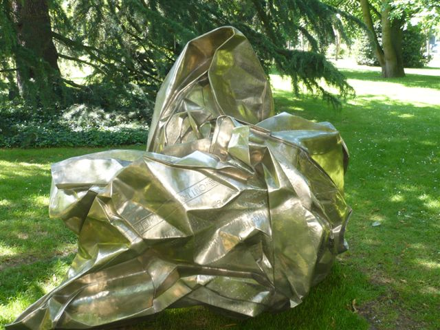 Skulptur China Daily von Wang Du im Skulpturenpark Viersen